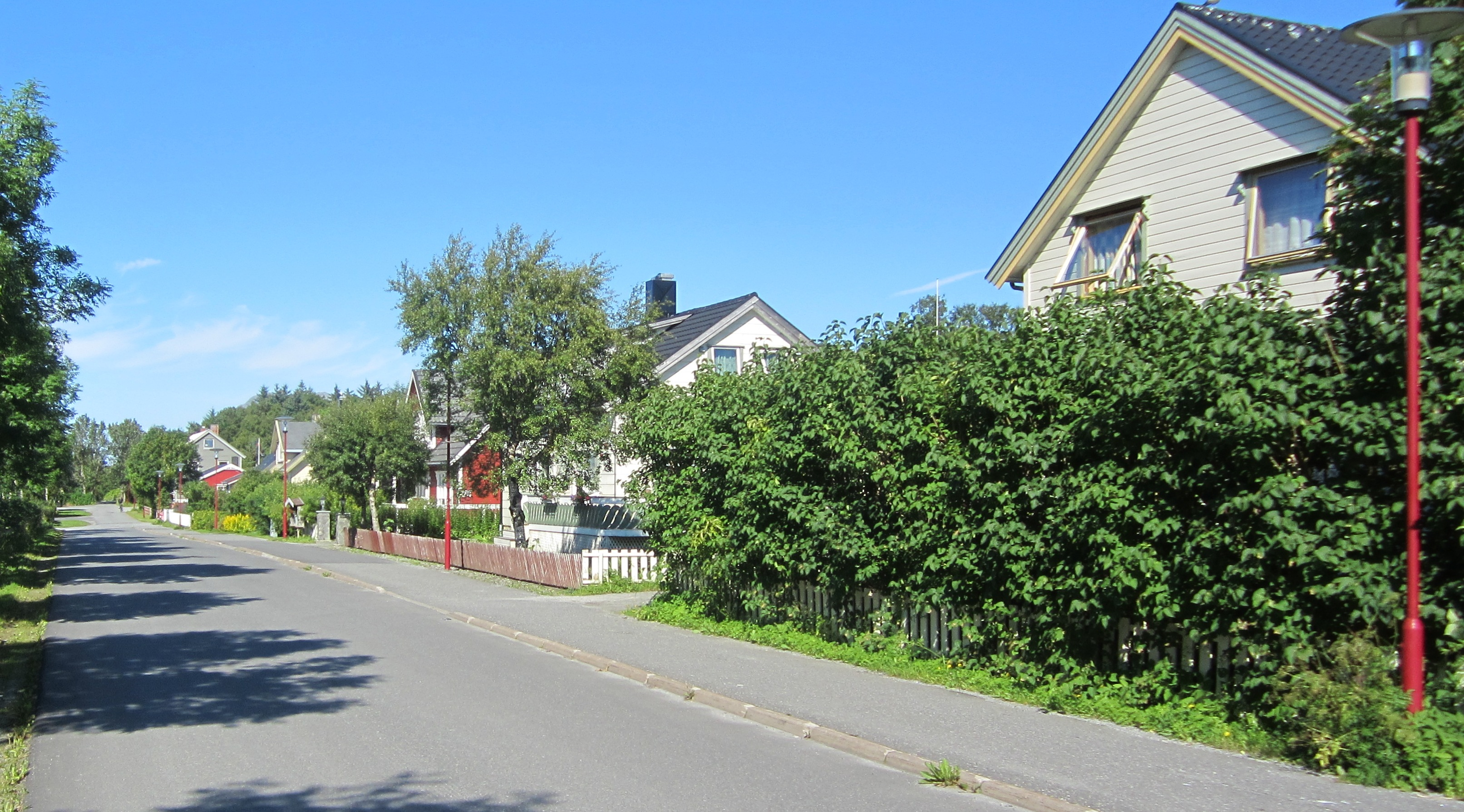 Adm. Storheills gate, Brønnøysund